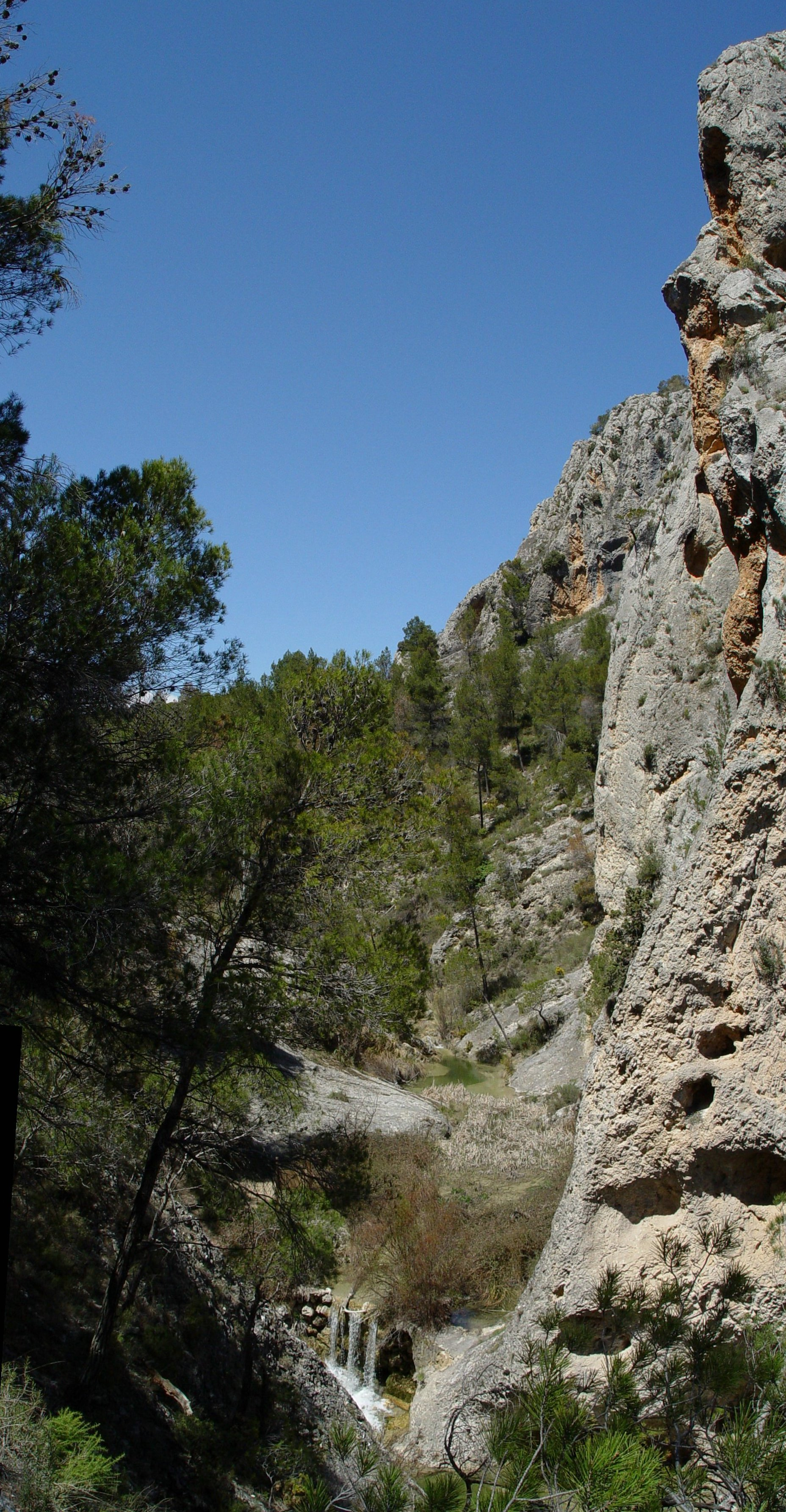 Canalons - Alcoi